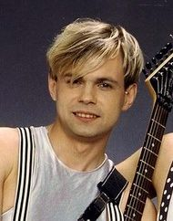 Бывший участник группы «На-На» Владимир Лёвкин.